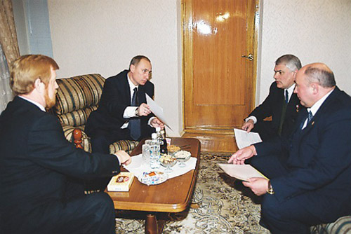 СЕВЕРОДВИНСК. С главой администрации Архангельской области Анатолием Ефремовым (слева), генеральным директором «Севмаша» Давидом Пашаевым и генеральным директором судостроительного предприятия «Звездочка» Николаем Калистратовым.